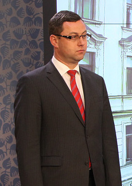 Zleva nejvyšší státní zástupce Pavel Zeman, ministr bez portfeje Petr Mlsna, premiér Petr Nečas (ODS), ministr spravedlnosti Pavel Blažek (ODS) a ministr vnitra Jan Kubice.